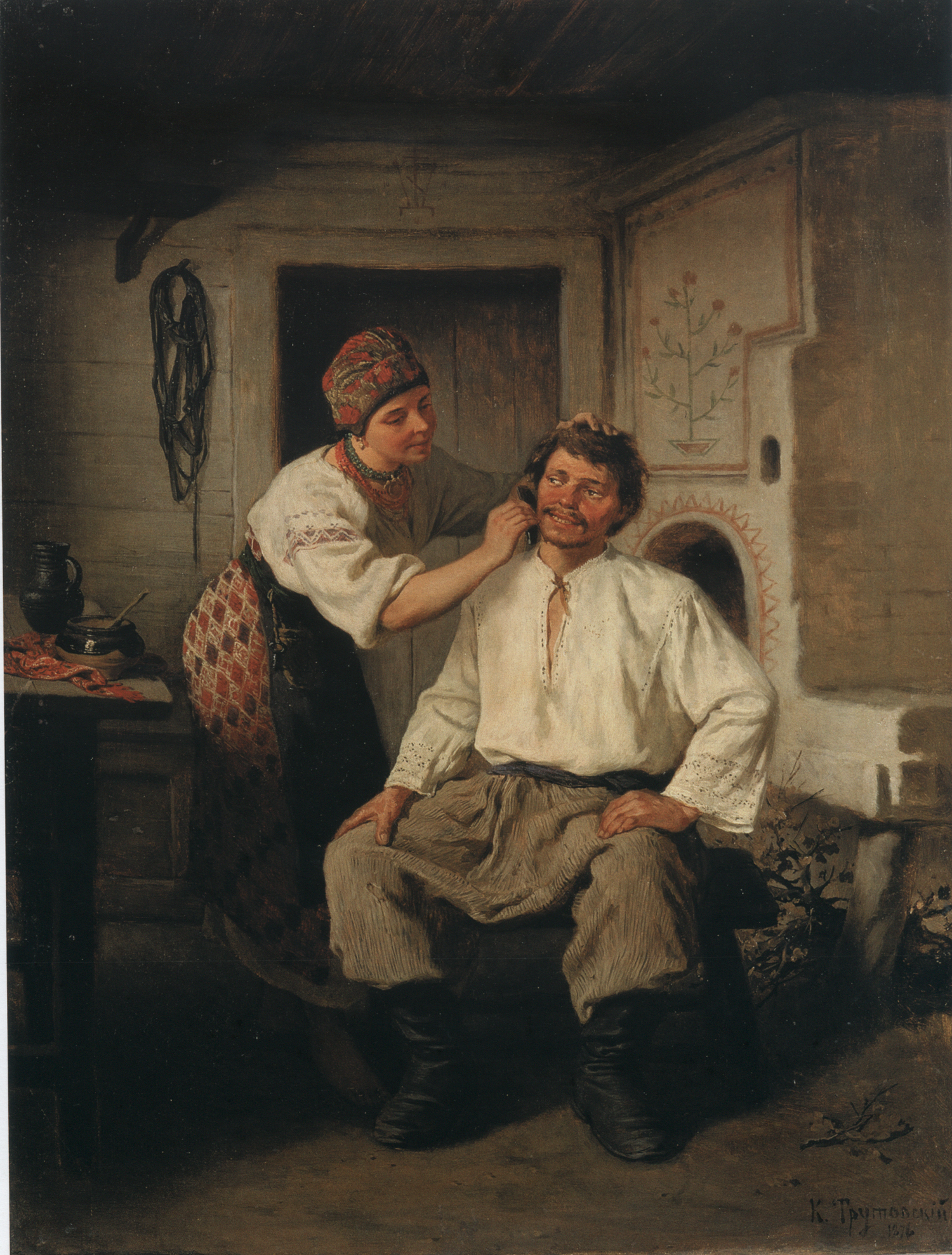 "Жанрова сцена" 1876. НХМУ.